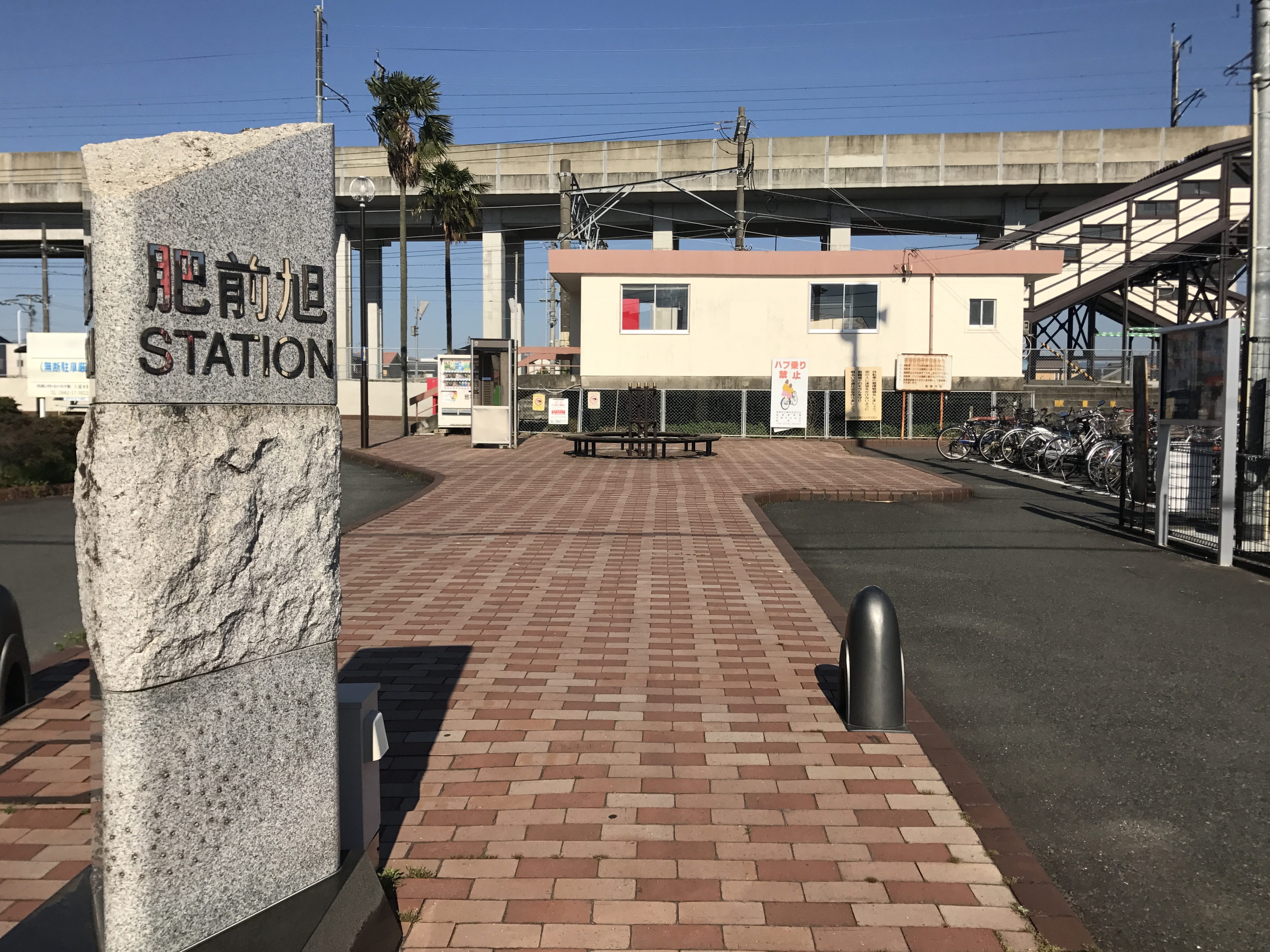 肥前旭駅の遠景